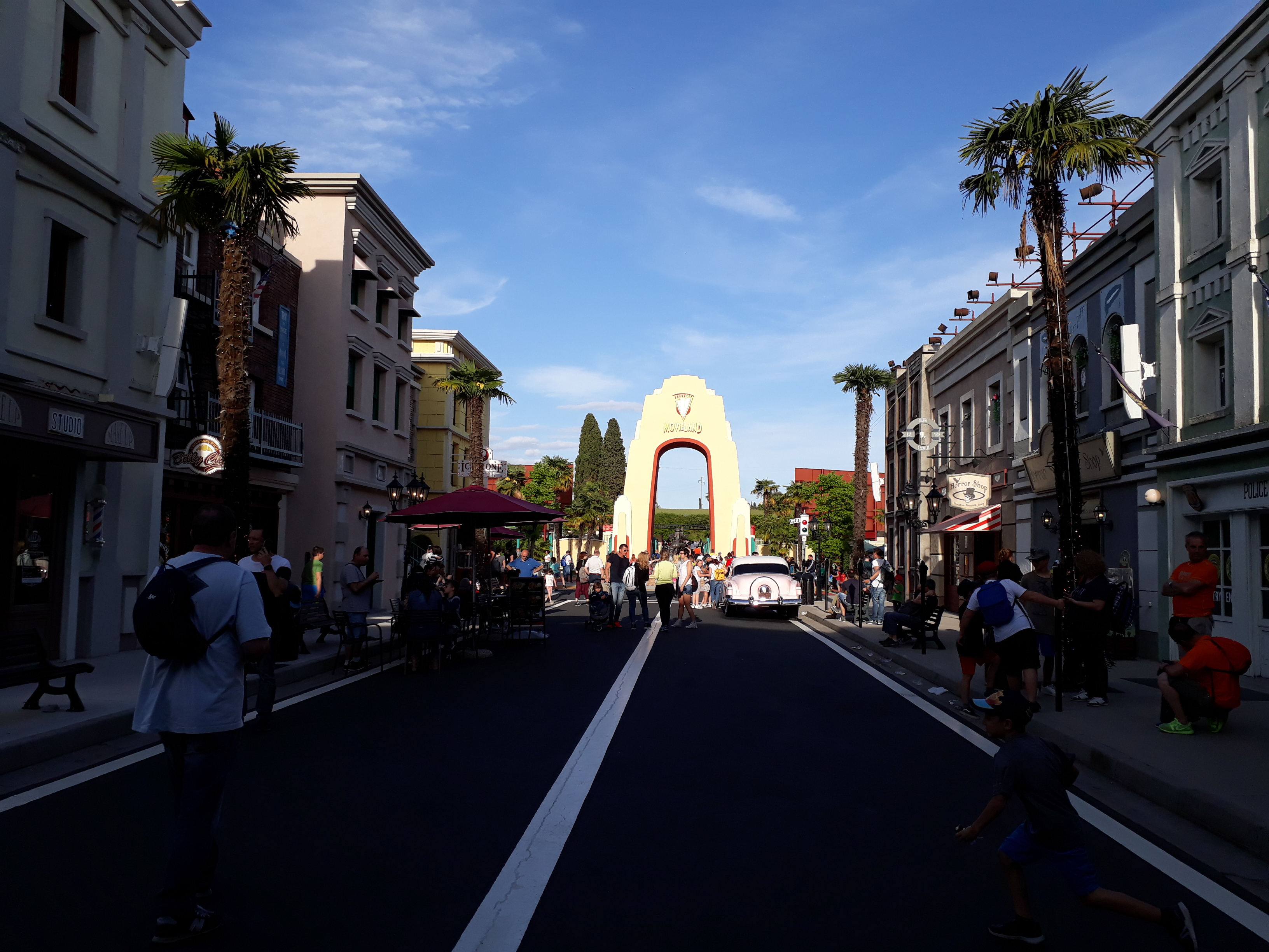 Main Street di Moviland